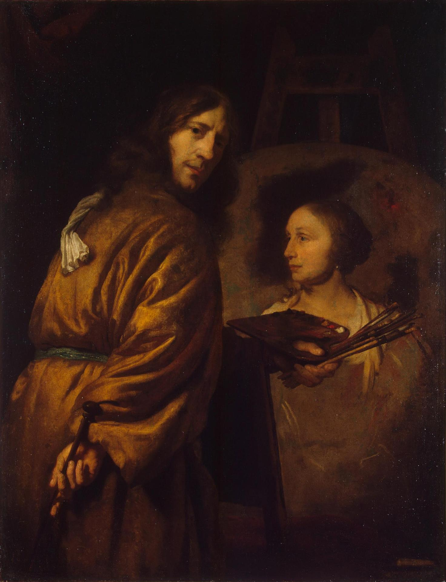 Selbstporträt vor Staffelei